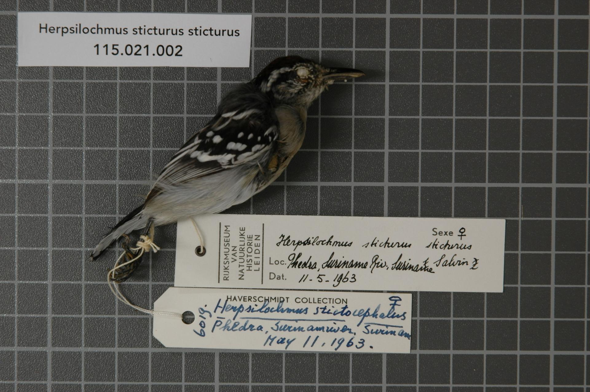 Herpsilochmus sticturus sticturus Salvin, 1885